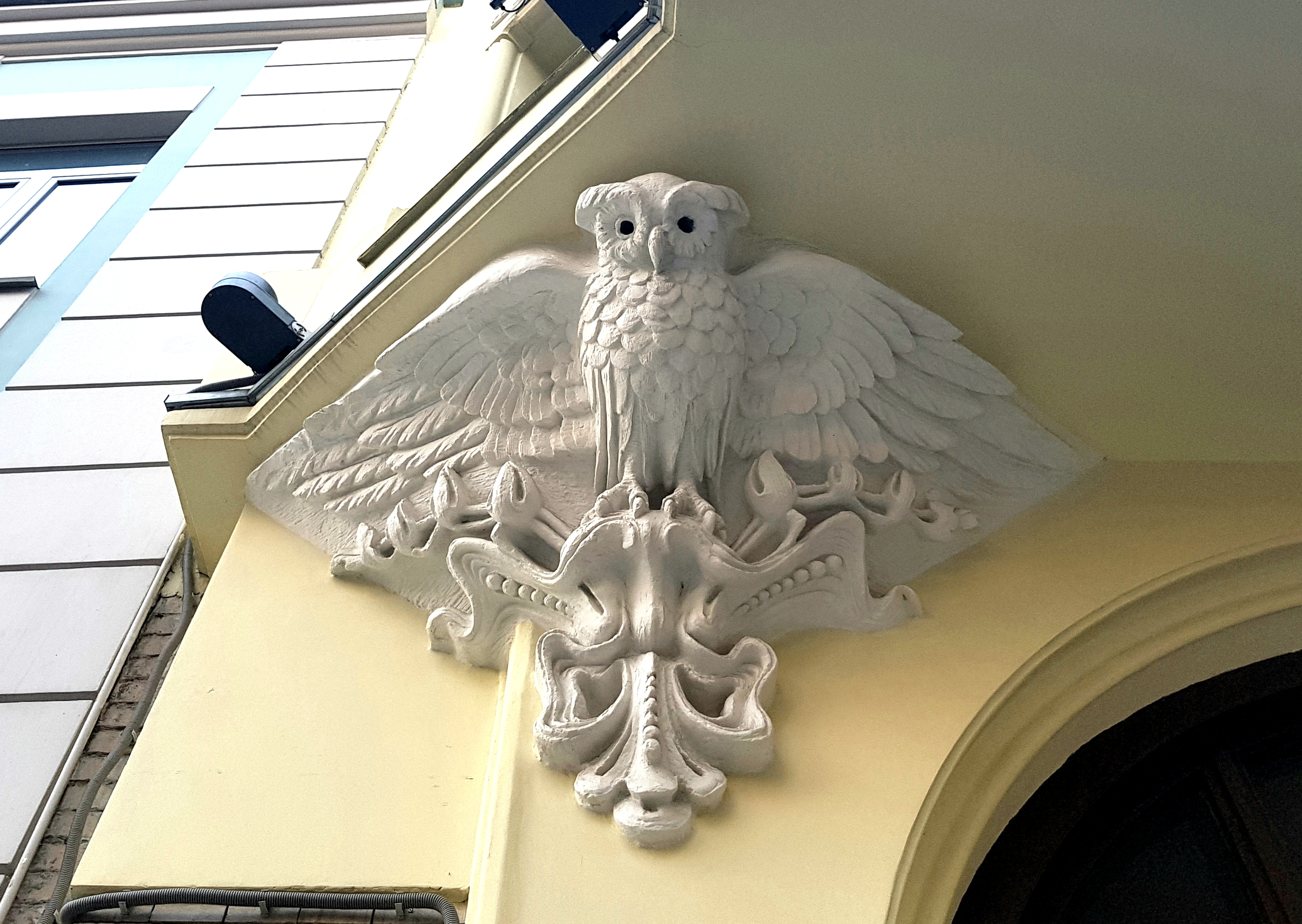 Лепной декор в основании эркера Доходного дома Бочаровых, 1902-1903 гг, арх-ры Л. Н. Кекушев, К. Ф. Буров. Москва, Гоголевский бульвар, д. 21, стр. 1